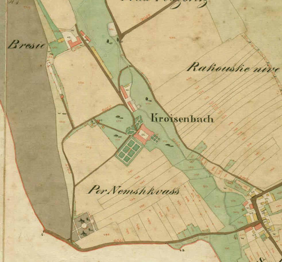 Franciscejski kataster za Kranjsko, 1823-1869